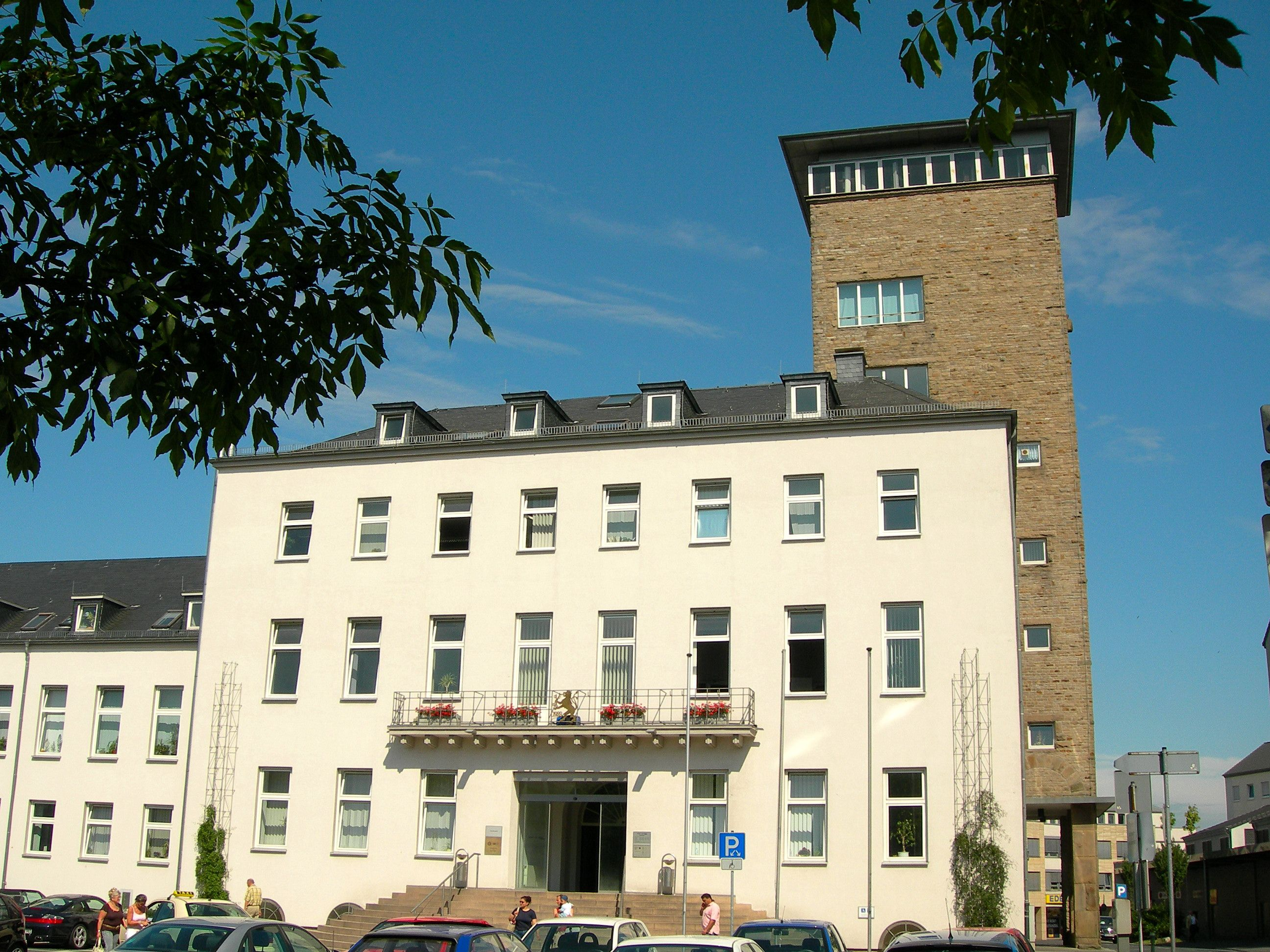 Rathaus, city hall, Velbert-Mitte, Germany